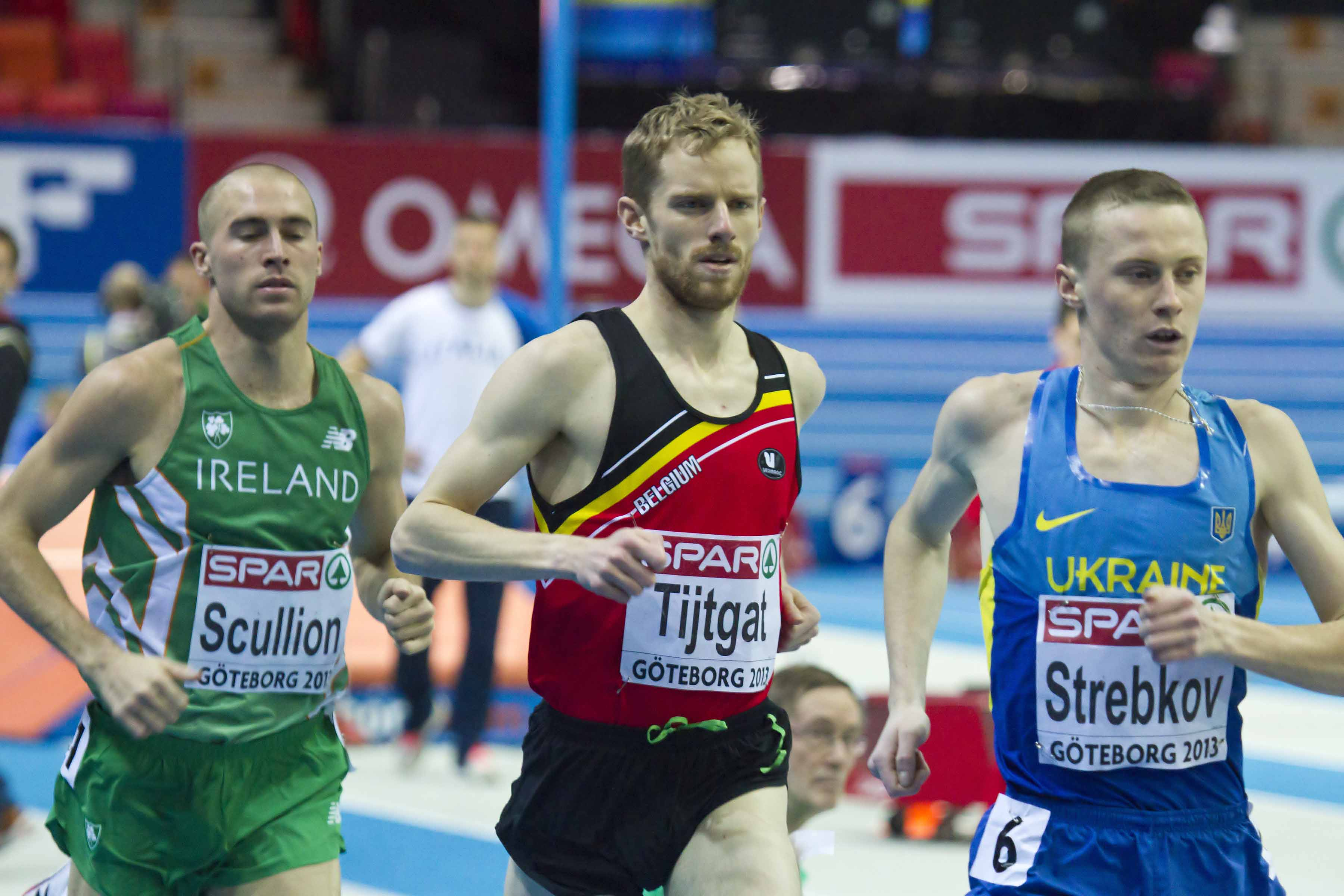 092 lander tijtgat reeksen 3000m